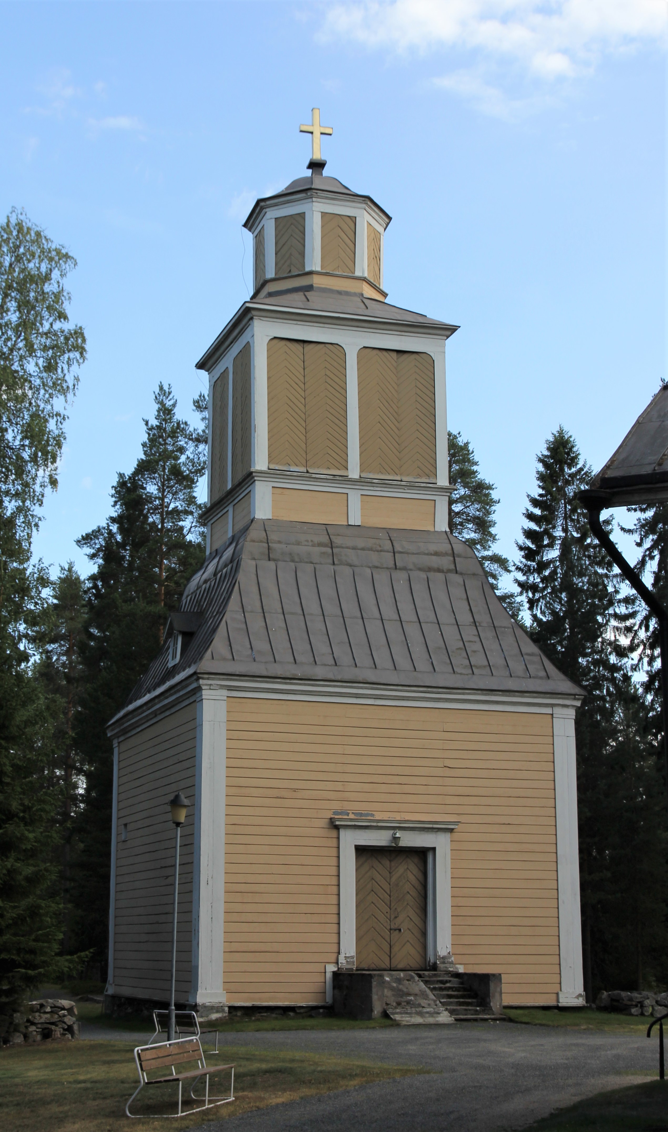 Jo Tuusniemen ensimmäisen kirkon ajalta oleva kellotapuli, joka on vuodelta 1818. Etuoikealla kirkon takaosan kattoa. Tuusniemen kirkko ja tapuli sijaitsevat Tuusniemen kirkonkylällä osoitteessa Keskitie 21, Tuusniemi. Kuva elokuulta 2019. Koordinaatit osoittavat kellotapulin sijainnin.